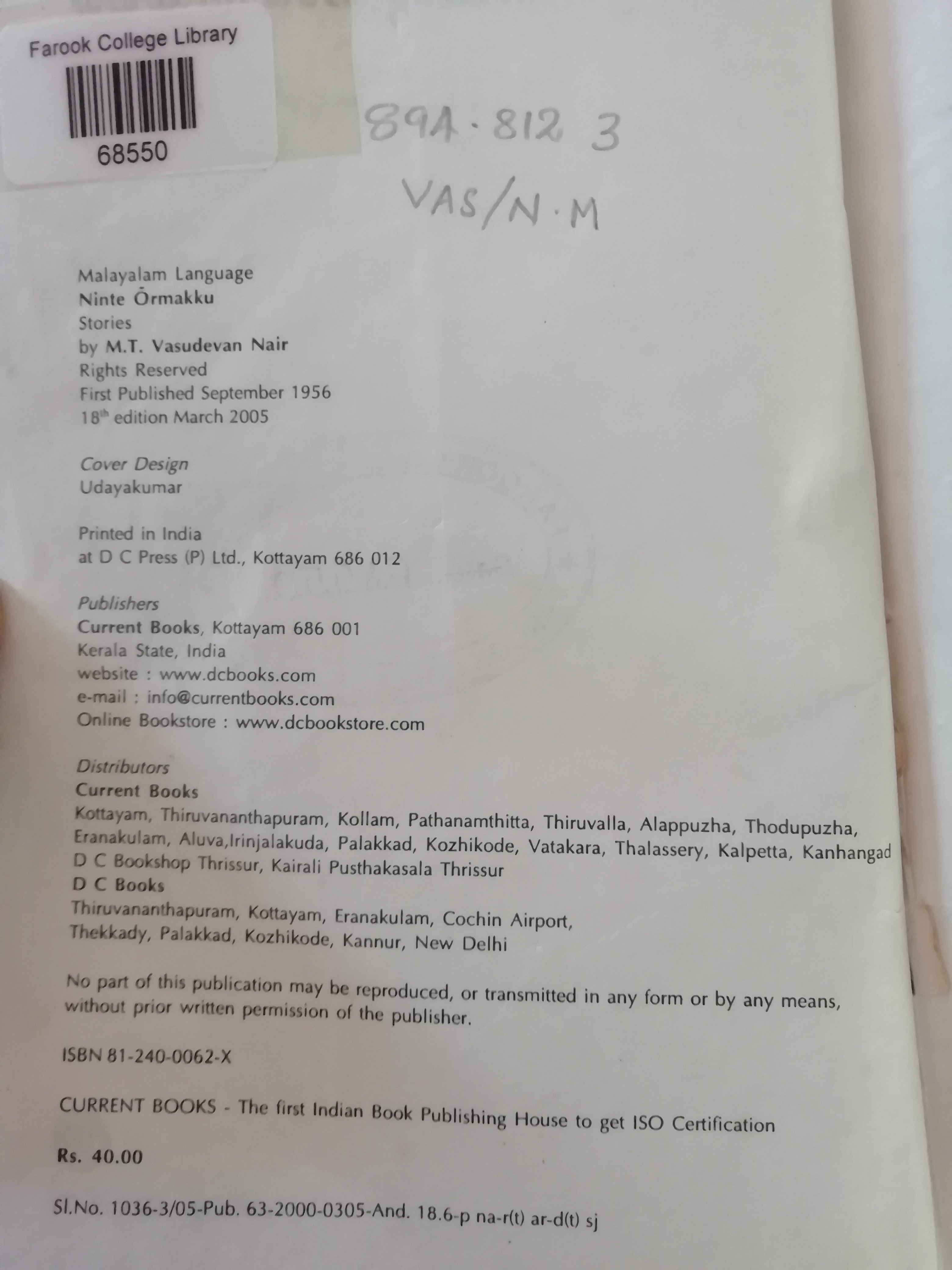 ആറ് ചെറിയെ കഥകൾ ഉള്ള ഒരു പുസ്തകമാണിത്